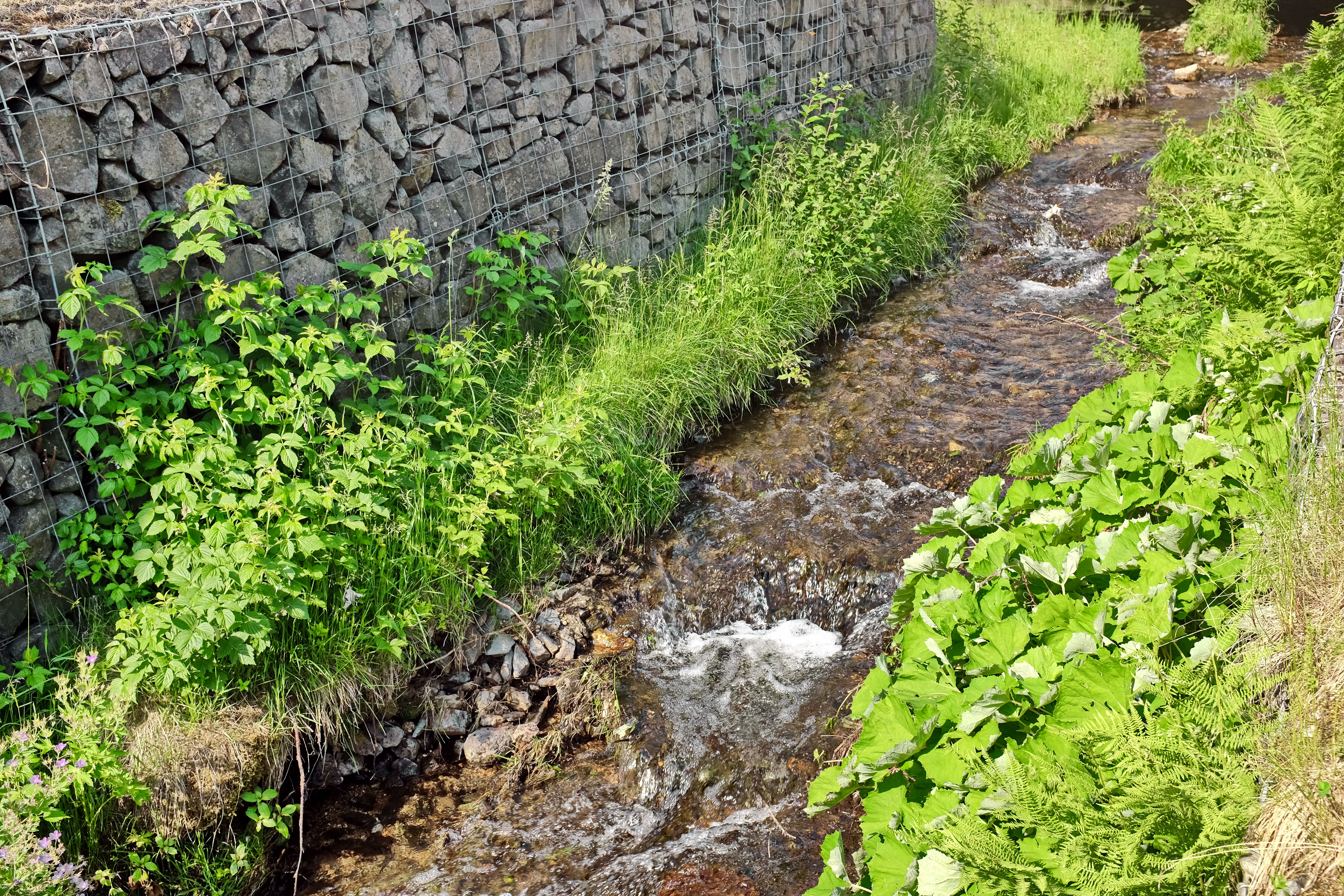 Bílý potok, v Nových Hamrech, Krušné hory, okres Karlovy Vary